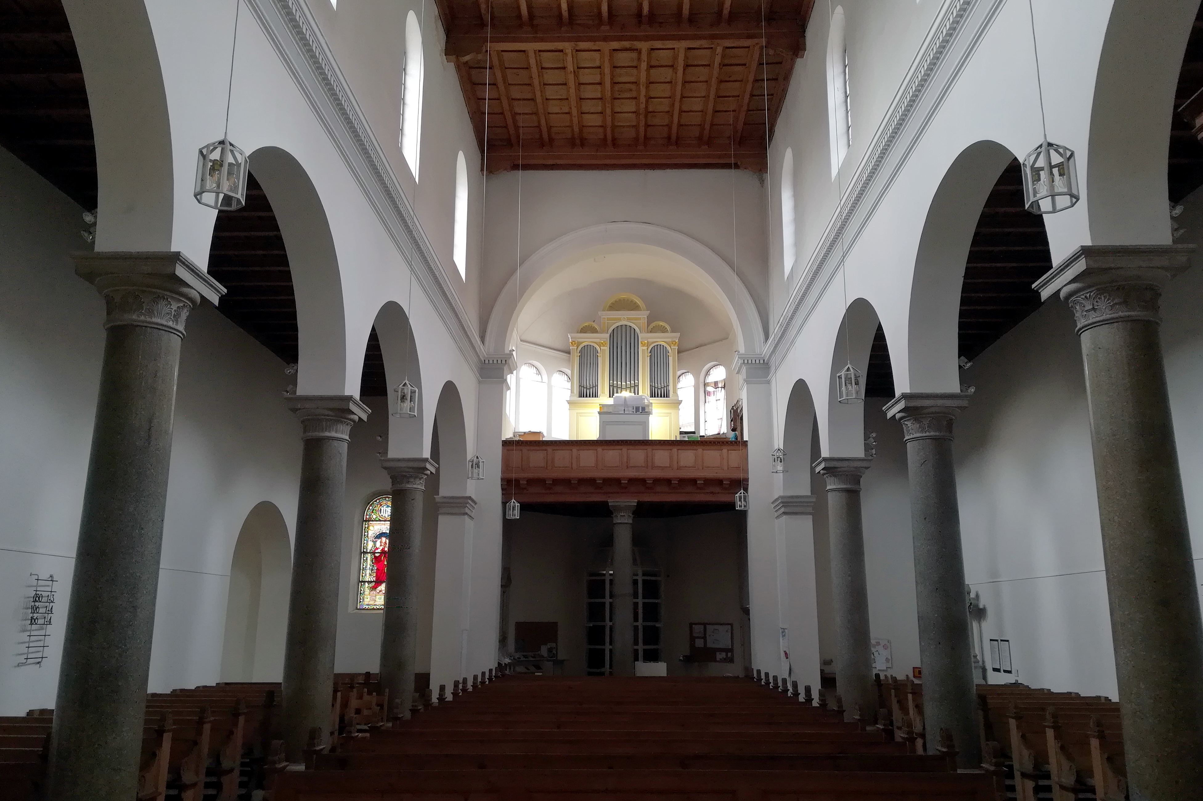 Die Erlöserkirche in Eichstätt ist eine evangelisch-lutherische Kirche.